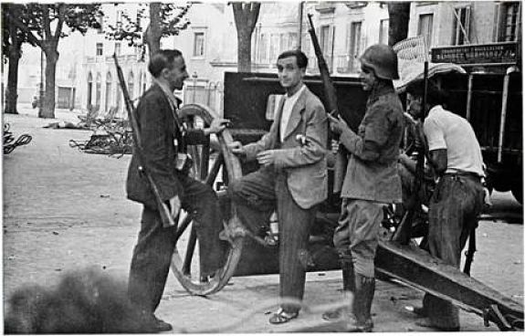 Francisco Ascaso Abadía (Almudévar, 1er avril 1901 – Barcelone, 20 juillet 1936) fut un militant anarcho-syndicaliste espagnol membre de la Confederación Nacional del Trabajo (CNT). Il meurt à Barcelone au tout début de la Guerre civile espagnole en combattant l'armée aux côtés de son camarade Buenaventura Durruti.